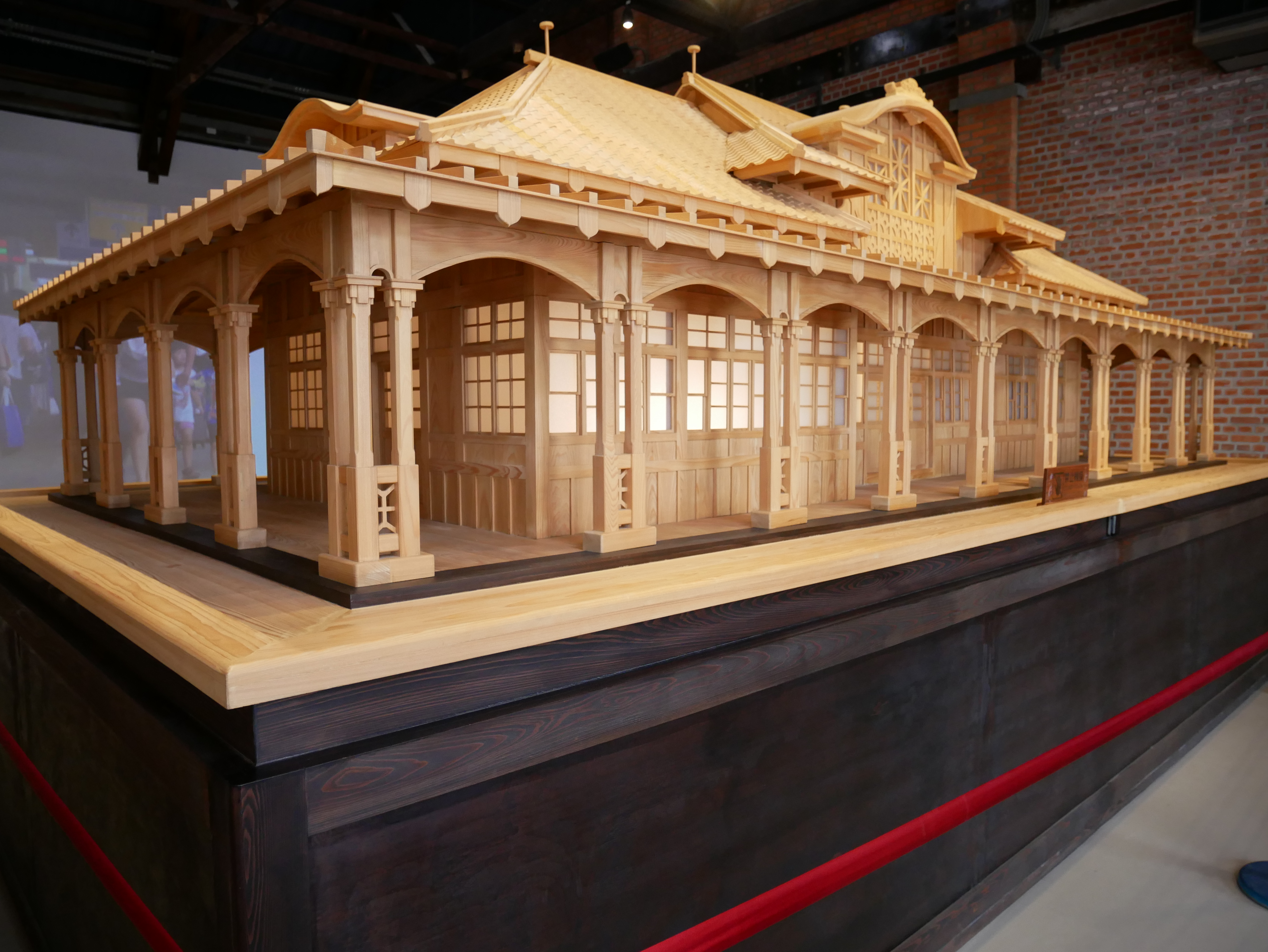 第二代桃園車站模型，桃園市桃園區市中次分區武陵里